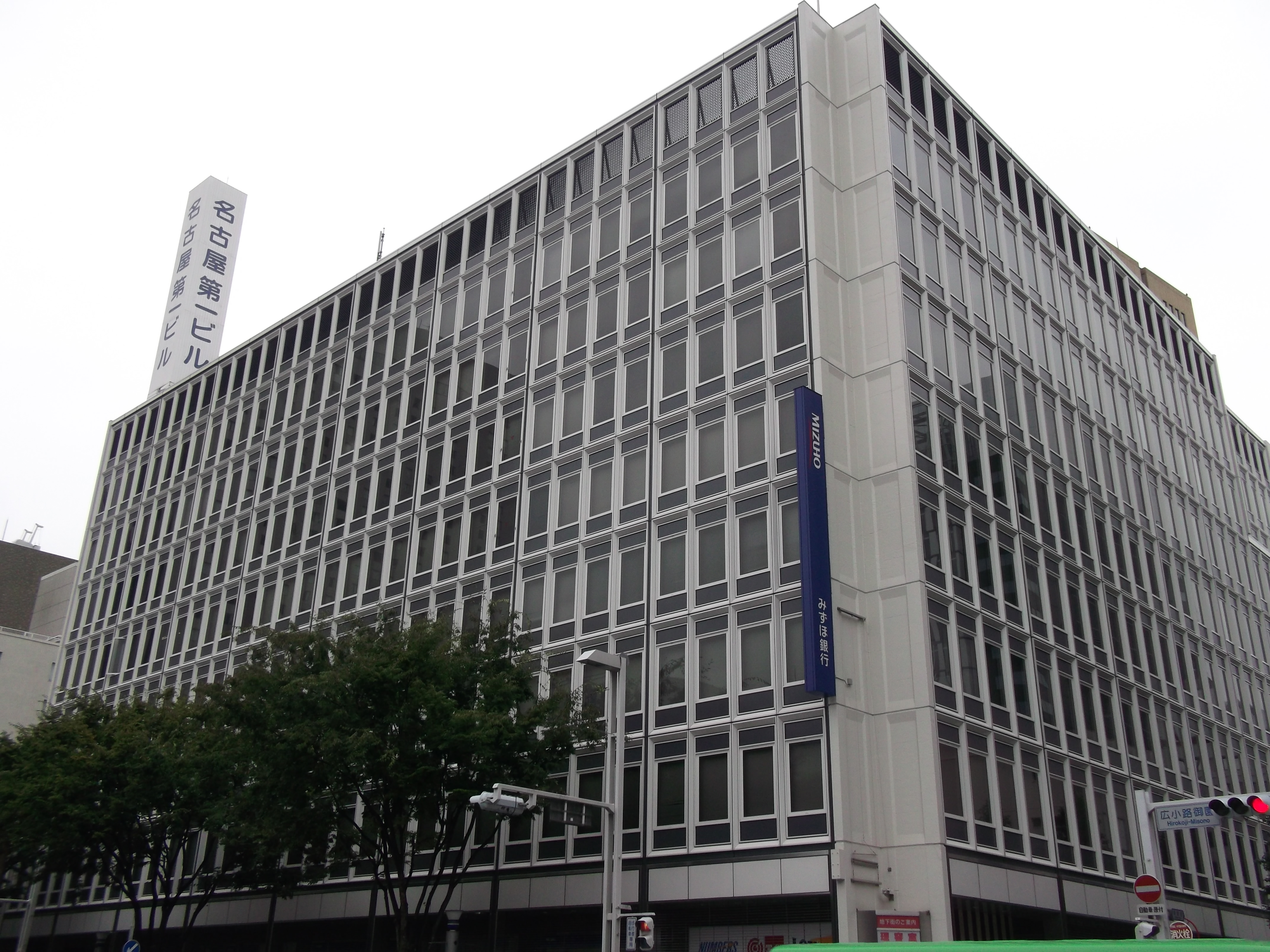 名古屋市中区の名古屋第一ビルを南側公道東側より撮影